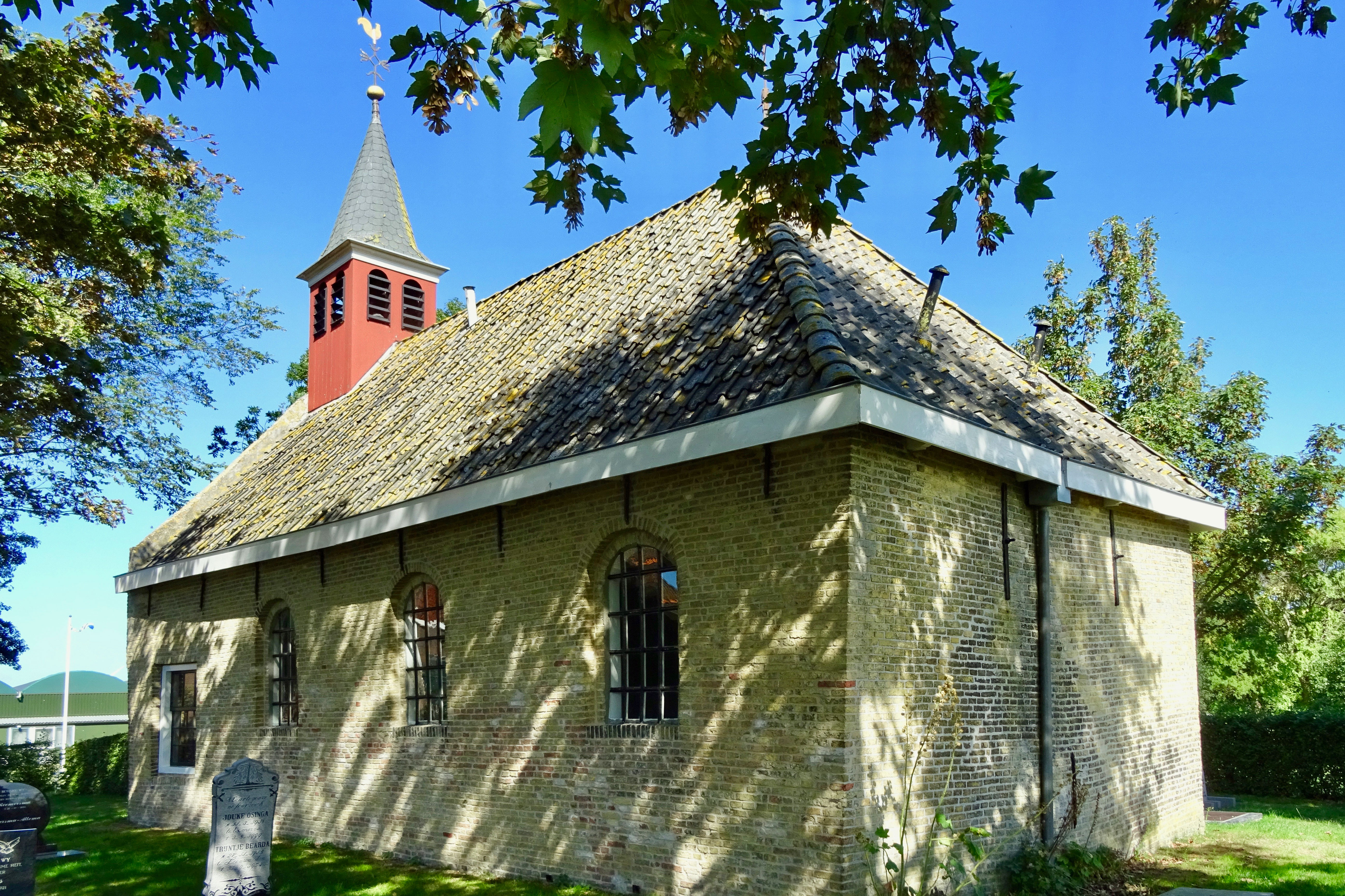 Kerk Nijhuizum